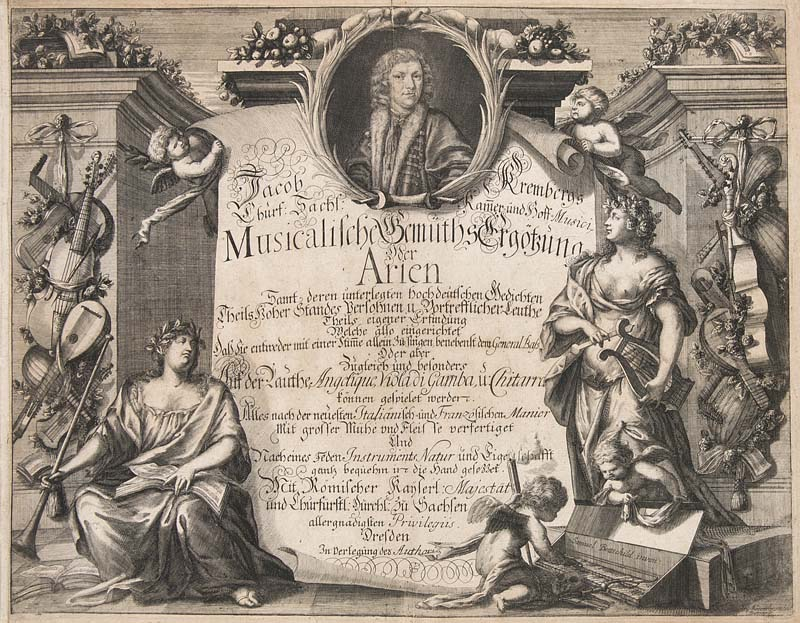 Musicalische Gemüths-Ergötzung, oder Arien, samt deren unterlegten hochdeutschen Gedichten, theils hoher Standes-Personen und vortrefflicher Leute, theils eigener Erfindung. Welche also eingerichtet, daß Sie mit einer Stimme allein zu singen benebenst dem General-Bass, oder aber zugleich und besonders auf der Lauthe, Angelique, Viola di Gamba, und Chitarra, können gespielt werden. Alles nach der neuesten Italienisch und Frantzösischen Manier mit großer Müh und Fleiss verfertigt, und nach eines ieden Instruments Natur und Eigenschafft gantz beqvehm in die Hand gesetzt.von Jakob Kremberg, Dresden, 1689